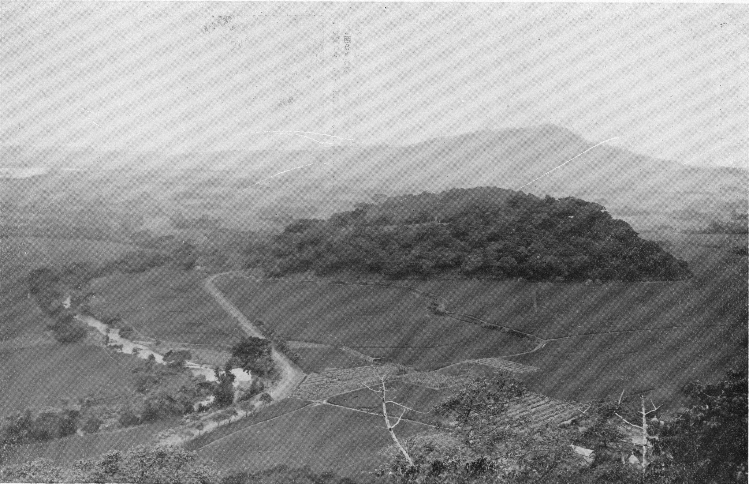 中文（台灣）: 作者：勝山吉作。芝山岩。典藏者：中央研究院數位物件典藏者：中央研究院數位文化中心。公眾領域標章（Public Domain Mark）。發佈於《開放博物館》 士林車站北方一公里處。